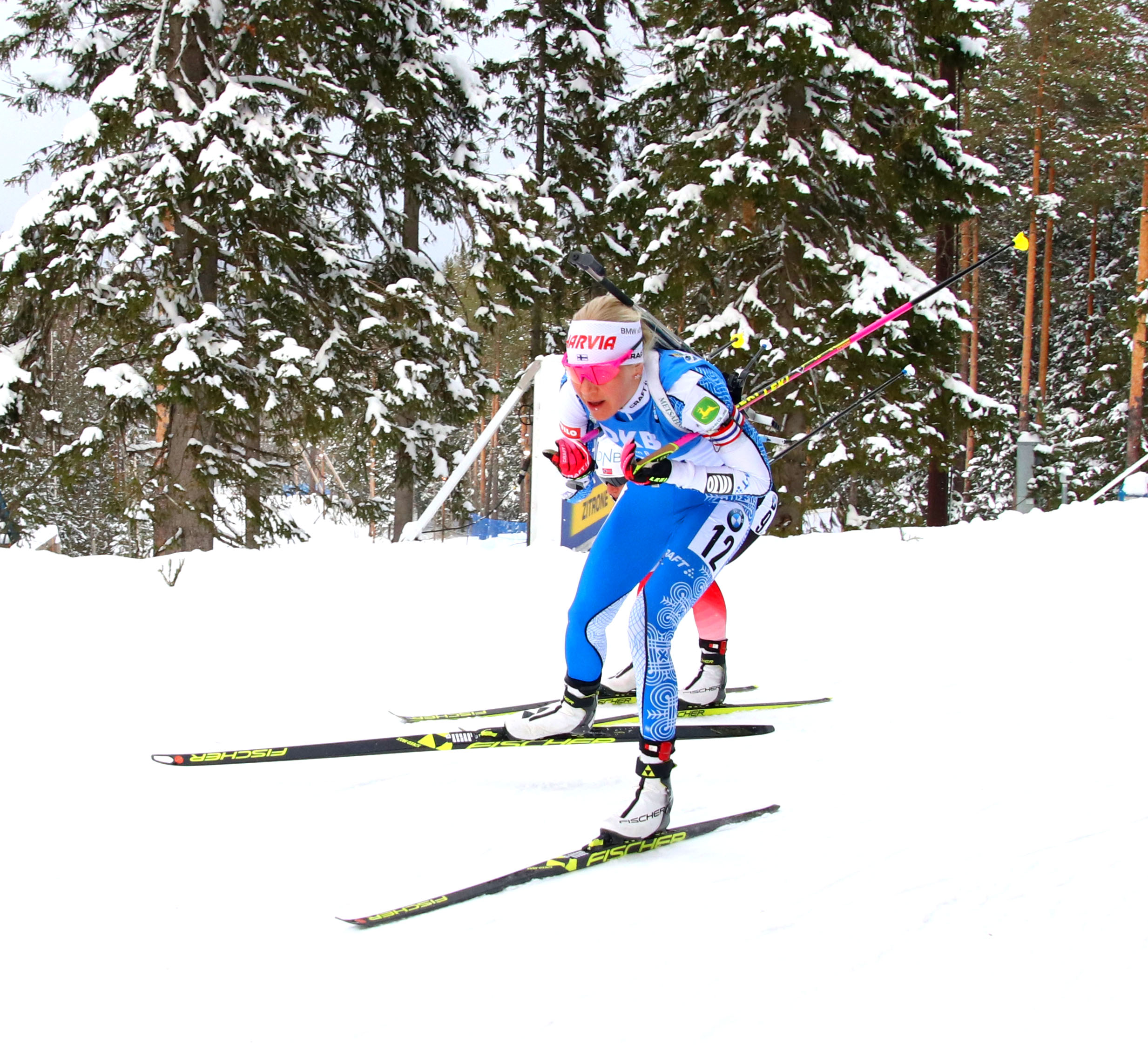 Östersund. Kaisa Mäkäräinen på skidskytte-VM.